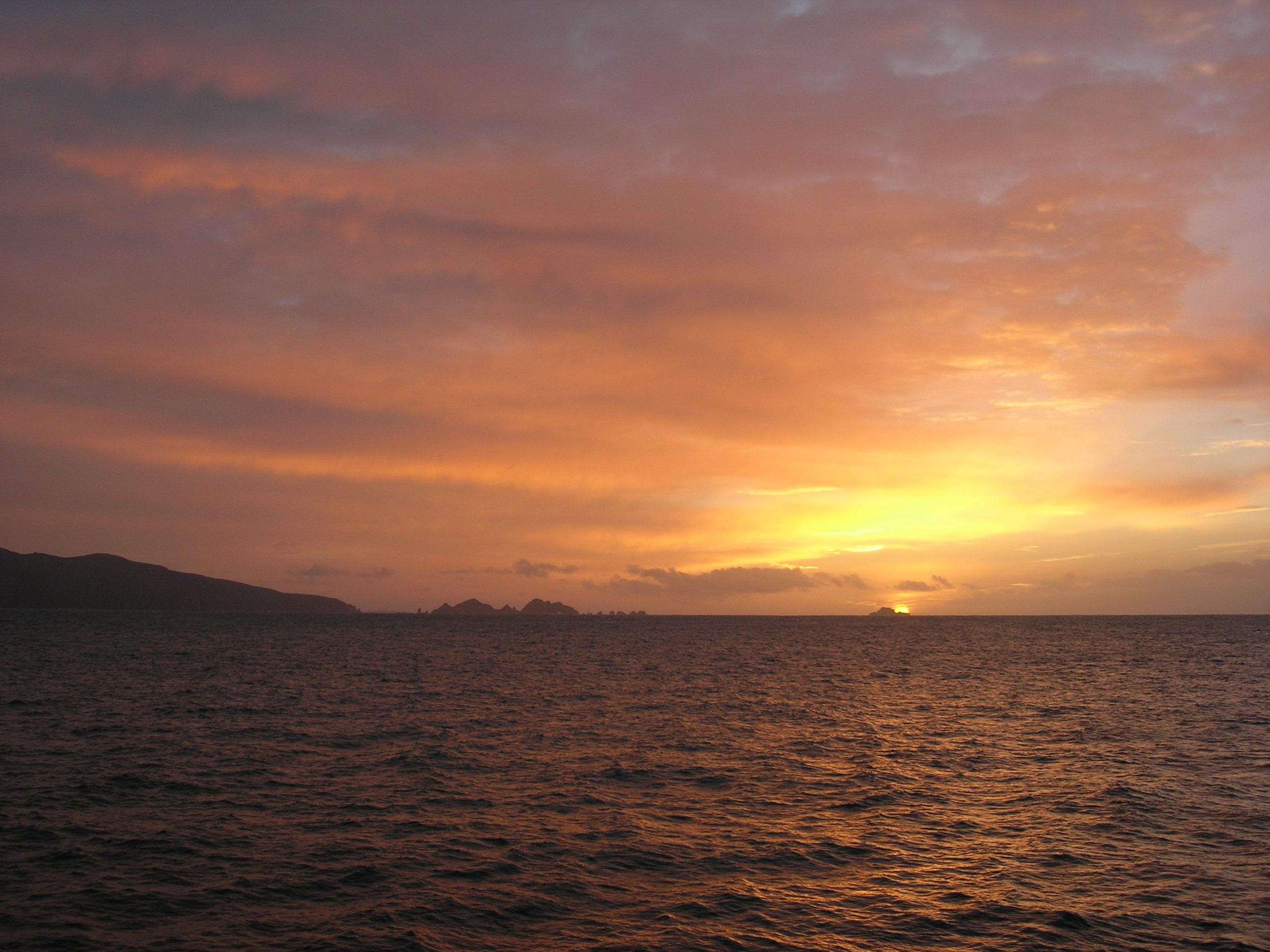 Description = Levé de soleil sur l'ile Deceit depuis le Cap Horn Source =Photo taken by Remi Jouan Date =Avril 2006 Author =Remi Jouan